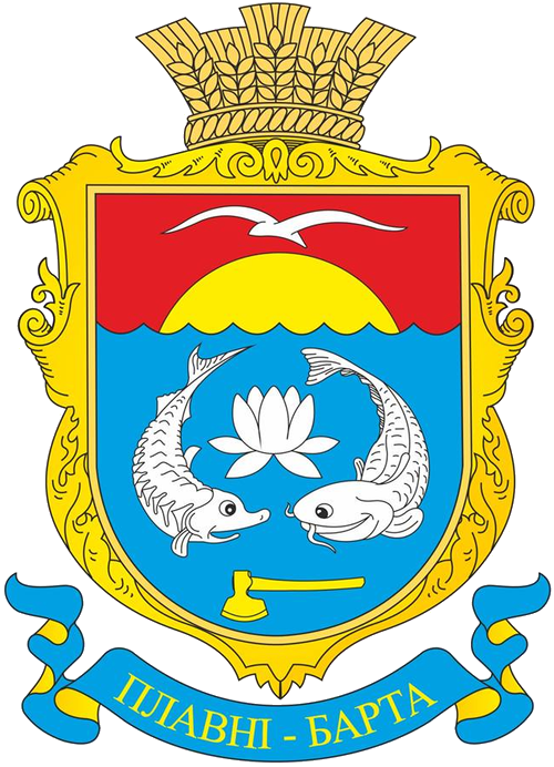 Герб села Плавні (Ренійський район)